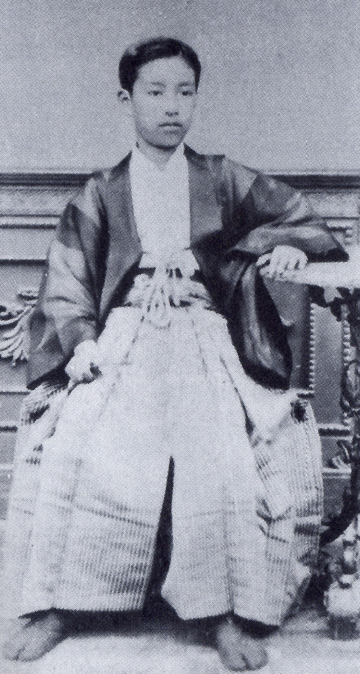 堀直弘の肖像。